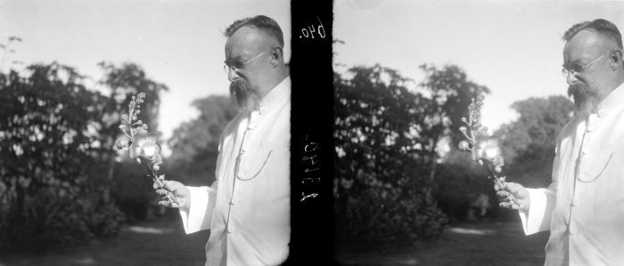 Stereonegatief. W.M. Docters van Leeuwen, directeur van 's Lands Plantentuin in Buitenzorg, met een tak van de Couroupita guianensis (kanonskogelboom)